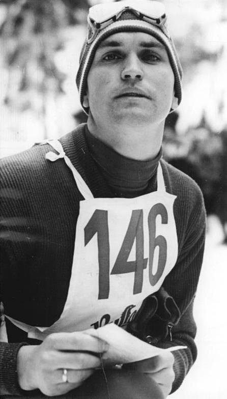 Zentralbild 22.2.1963 XIV. Deutsche Meisterschaften in den Nordischen Disziplinen Die XIV. Deutschen Meisterschaften in den Nordischen Disziplinen werden vom 20. bis 24. Februar 1963 in Klingenthal-Erzgebirge ausgetragen. UBz: Im Kombinationssprunglauf (21.2.63) belegte Rainer Dietel (SC Dynamo Klingenthal) auf der Großen Vogtlandschanze in Mühlleithen den 1. Platz. Hier beobachtet Dietel seine Konkurrenten.